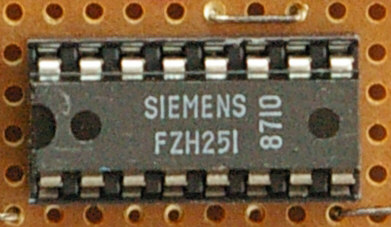 FZH251, ein Logikbaustein aus der Familie der Langsamen Störsicheren Logik. Vier AND mit je 2 Eingängen, zwei mit N-Anschluß